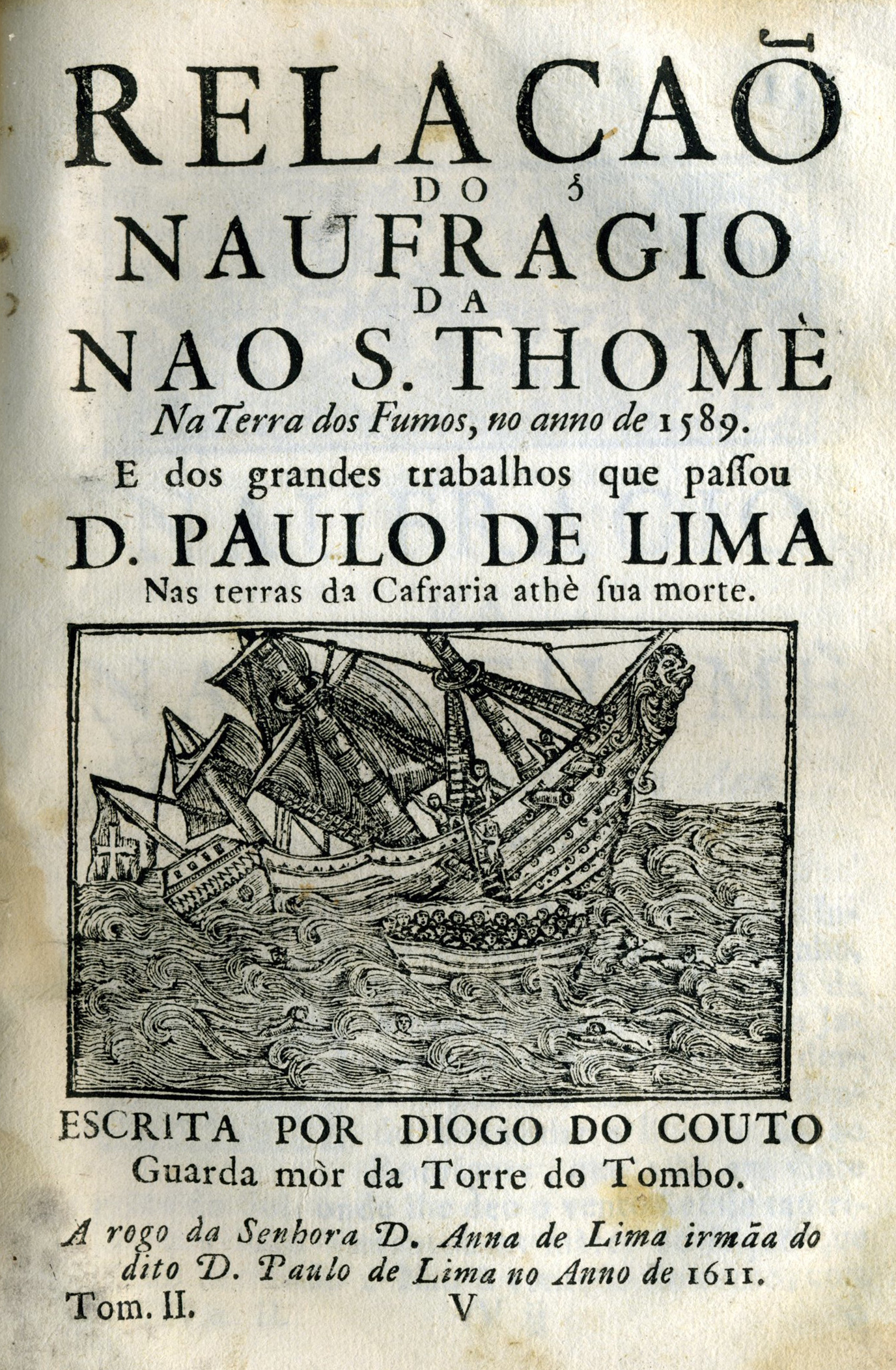 Histoire tragico-maritime, de Bernardo Gomes de Brito, 1736-1736 : relation de Diogo do Couto